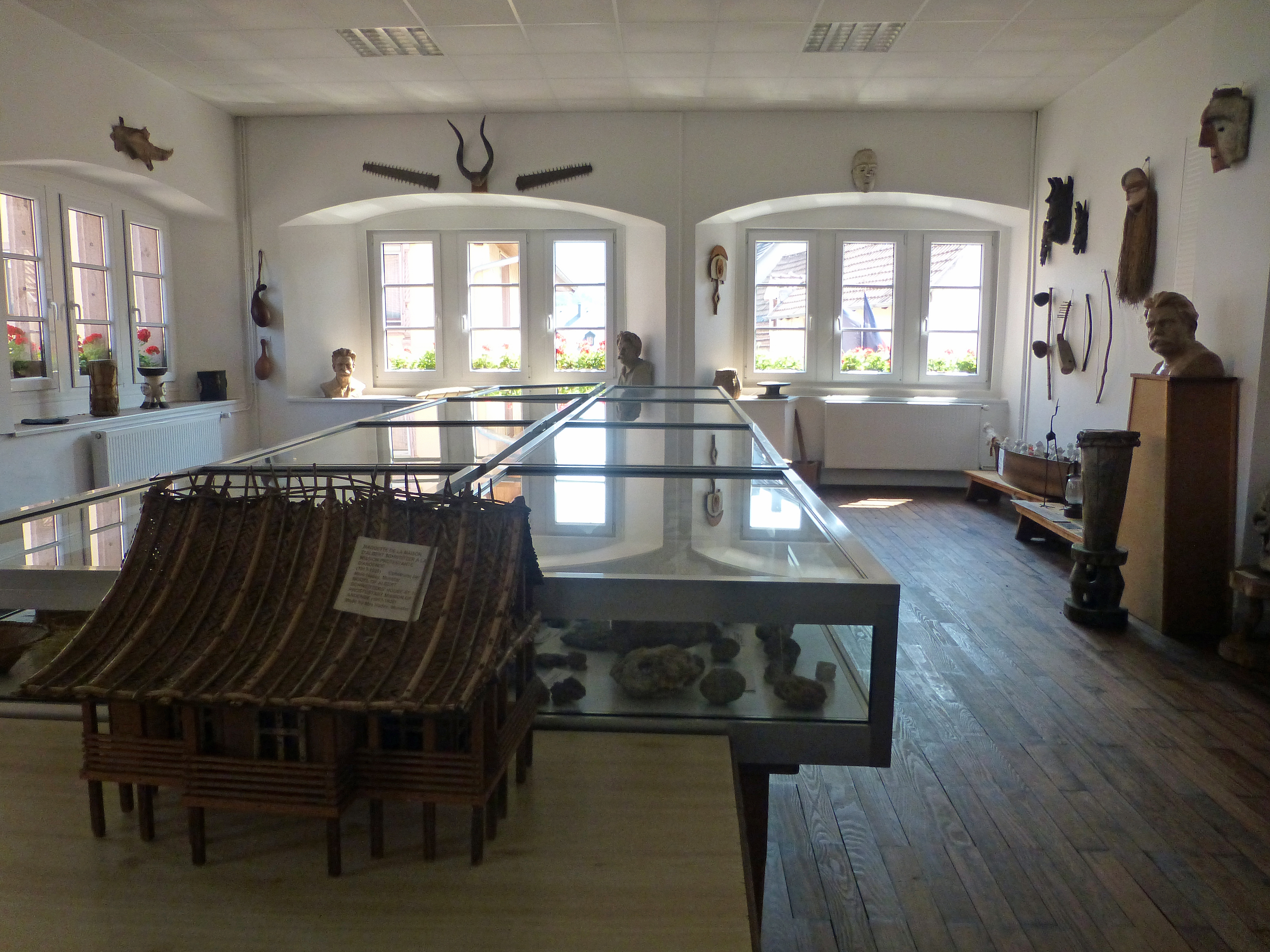 Musée africain de Gunsbach (Haut-Rhin) : salle d'exposition au premier étage de hôtel de ville. Souvenirs rapportés du Gabon par Emma Haussknecht, infirmière et collaboratrice du docteur Albert Schweitzer à Lambaréné de 1925 à 1957 : collection d'armes, de pierres, sculptures en ivoire et ébène, pagnes, cornes d'antilopes.